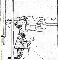 Albéric Bourgeois, Les Aventures de Timothée (La Patrie, 1904) « Le 30 janvier 1904, dans le quotidien québécois La Patrie, paraissent Les Aventures de Timothée, signées Albéric Bourgeois. C’est la première fois qu’une bande dessinée en français utilise les bulles. Dans cette image au tracé trop géométrique on est frappé par la dissonance produite par le contour maladroit de la bulle qui recouvre très visiblement le centre de la case, dissonance que l'on retrouve entre l’apparence grotesque du personnage traité de façon caricaturale et son discours : « Nul ne résistera à mes charmes ». Discours qui peut se comprendre comme à destination tant de ses éventuelles et rêvées proies féminines que d’un lectorat que la bulle a désormais résolu de séduire et qui, de fait, sera bientôt pris. »